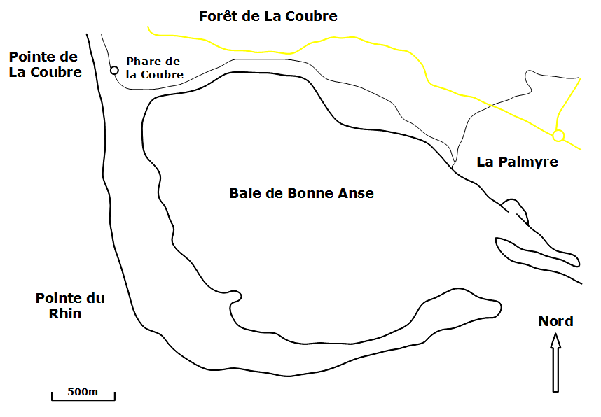 Plan de la Baie de Bonne Anse sur la commune des Mathes